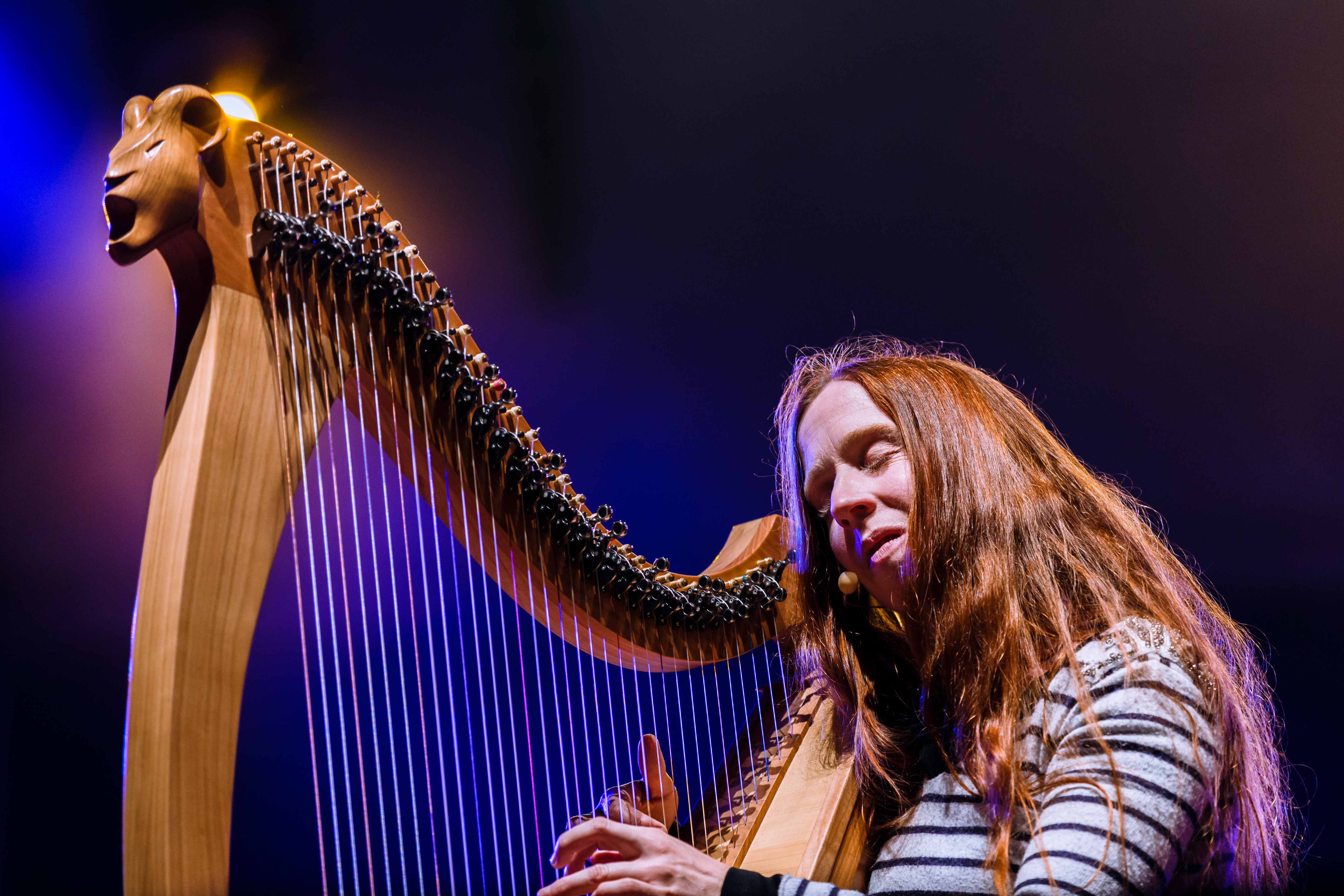 Cécile Corbel en concert à Quimper dans le cadre du festival de Cornouaille le 20 juillet 2017.